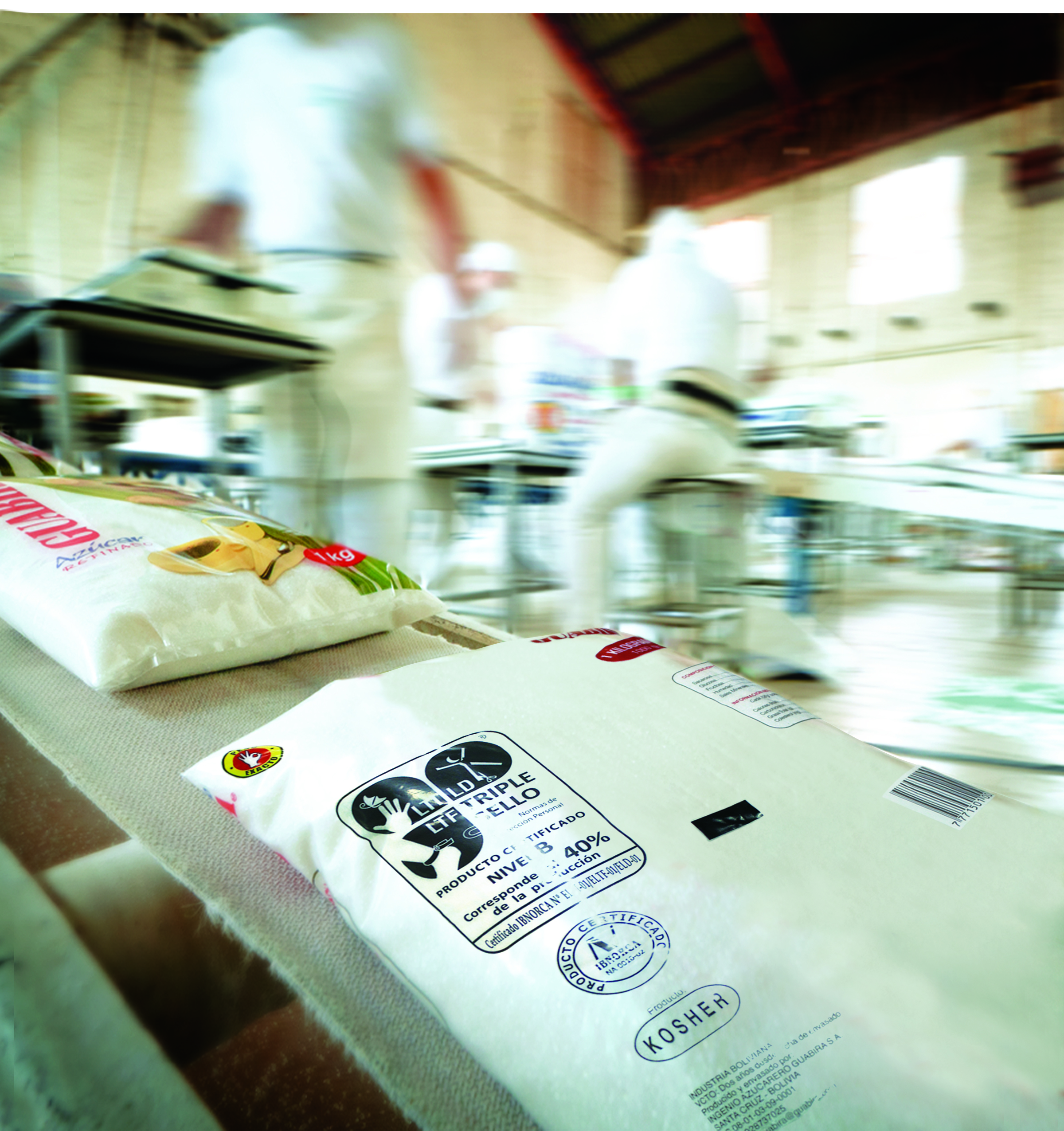 Logo del Triple Sello en bolsa de azúcar Guabirá. Propiedad intelectual del Instituto Boliviano de Comercio Exterior.